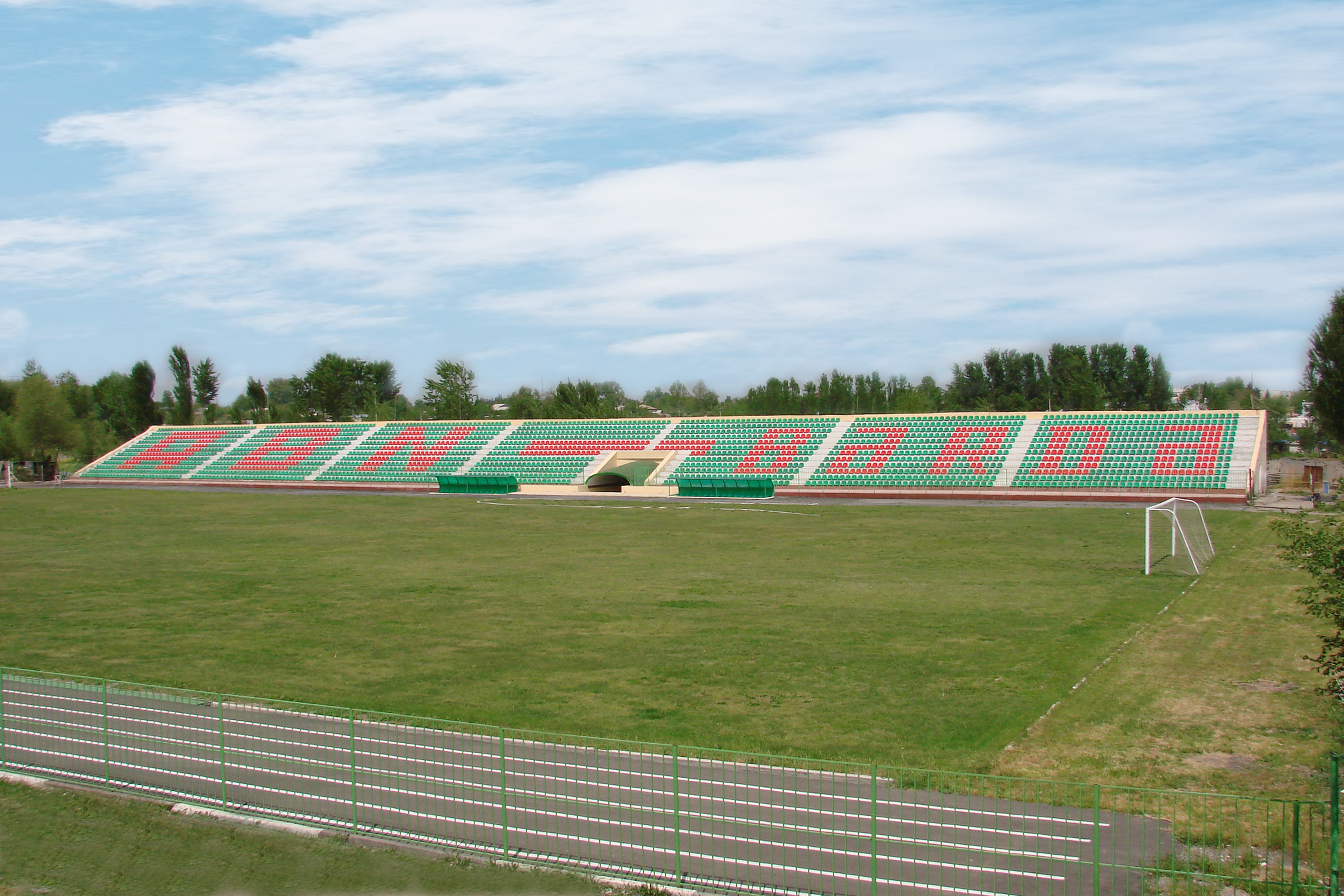 Bərdə stadionu